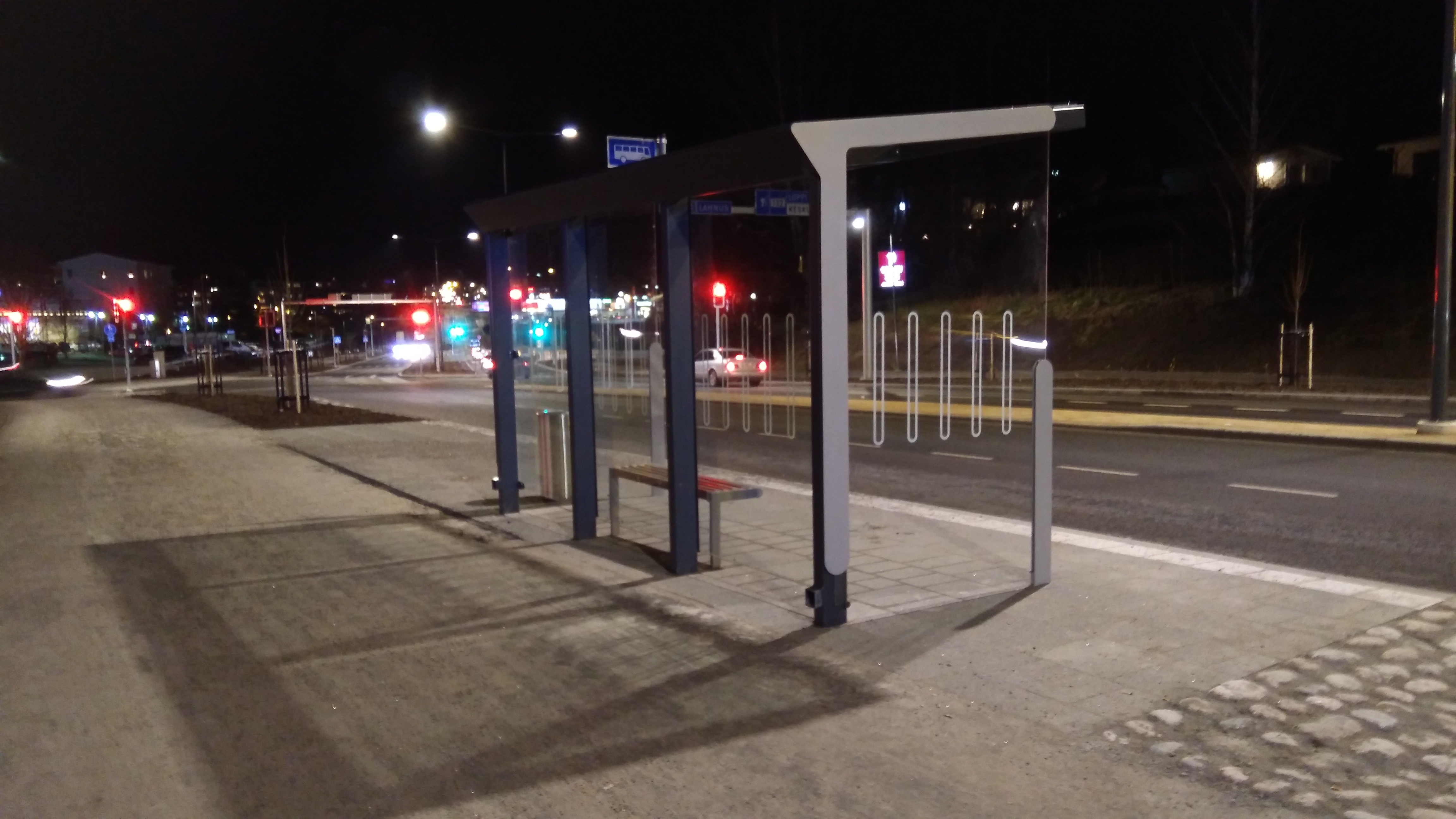 Bussipysäkki Klaukkalassa